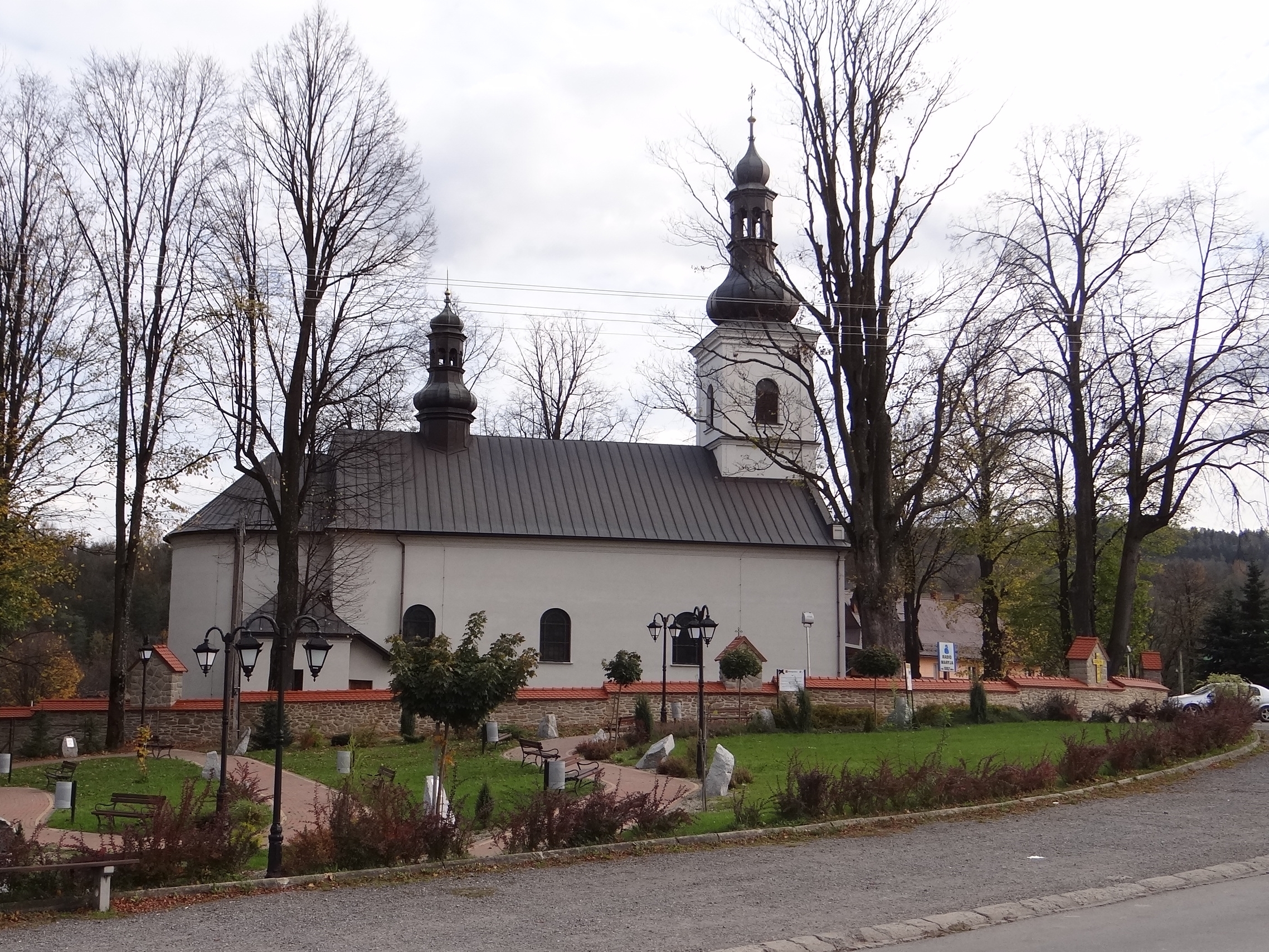 Sidzina - kościół rzymskokatolicki pw. św. Mikołaja, XVIII